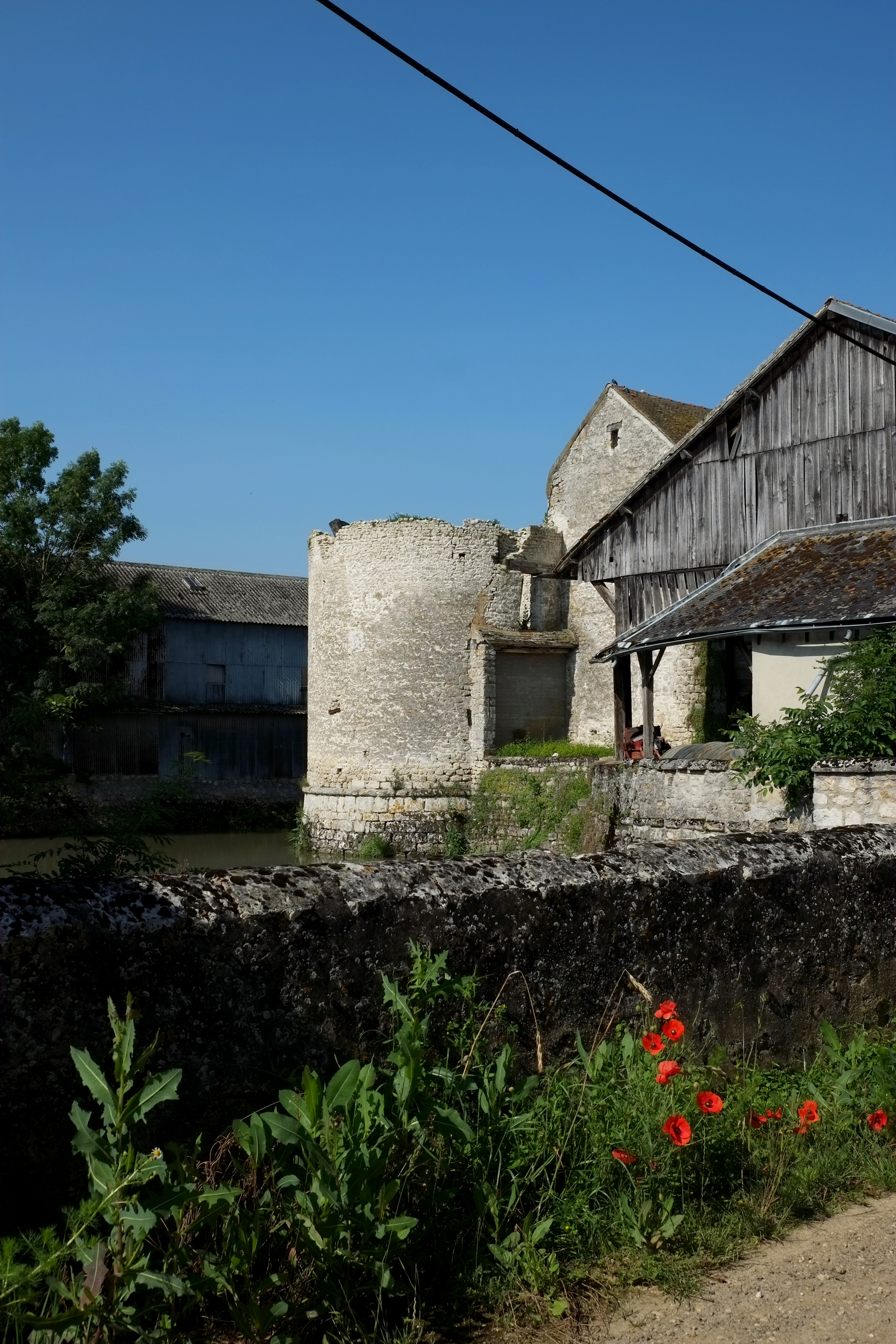 Ehemaliges Schloss in Beaumont-du-Gâtinais (Frankreich)